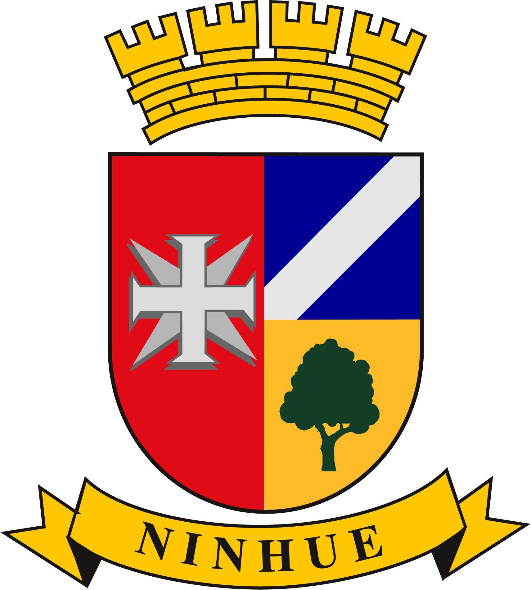 Imagen del escudo oficial de Ninhue, en su formato original, respetando las normas gràficas que corresponde.